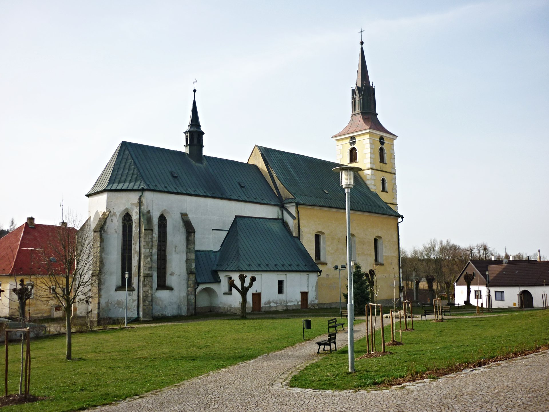 Deštná, kostel sv. Ottona, také uváděn jako kostel sv. Otto z Bambergu. Původně románská budova kostela má nyní zachovalý raně gotický presbytář, zbytek budovy (chrámová loď a původně barokní věž) byl dostavěn později a získal současnou klasicistní podobu